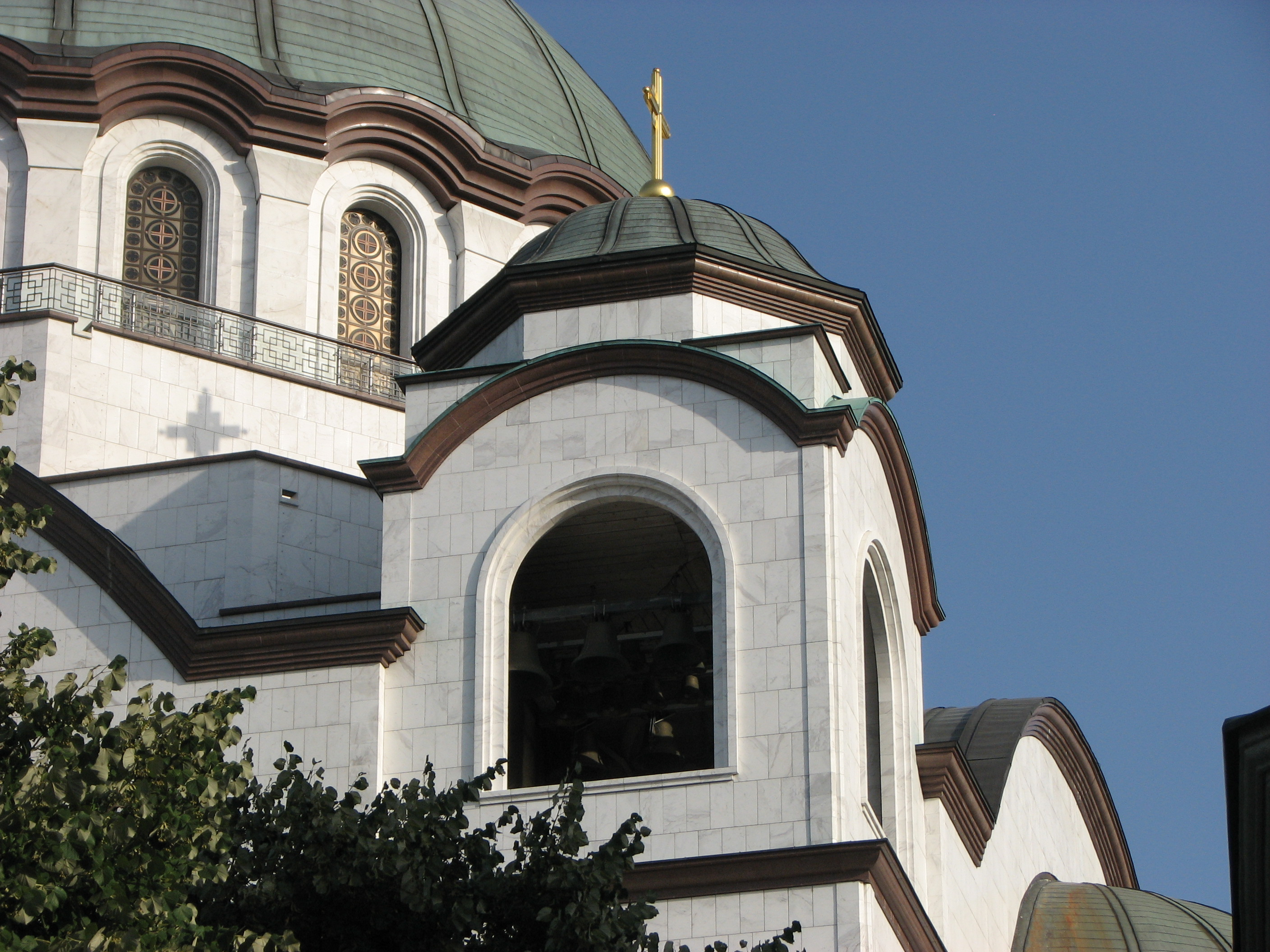 Temple of Saint Sava, Belgrade / Храм Светог Саве, Београд